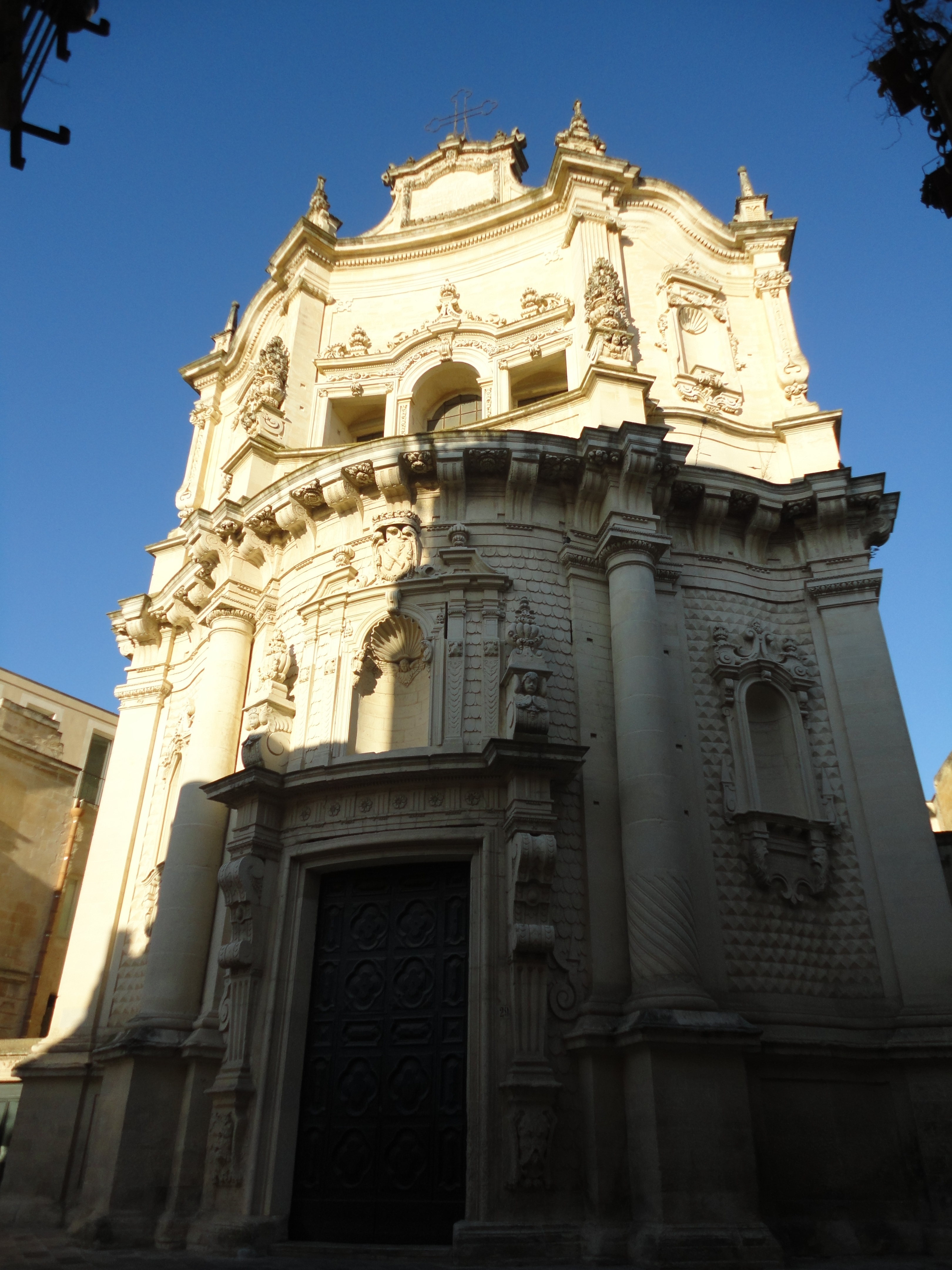 Lecce Chiesa di San matteo